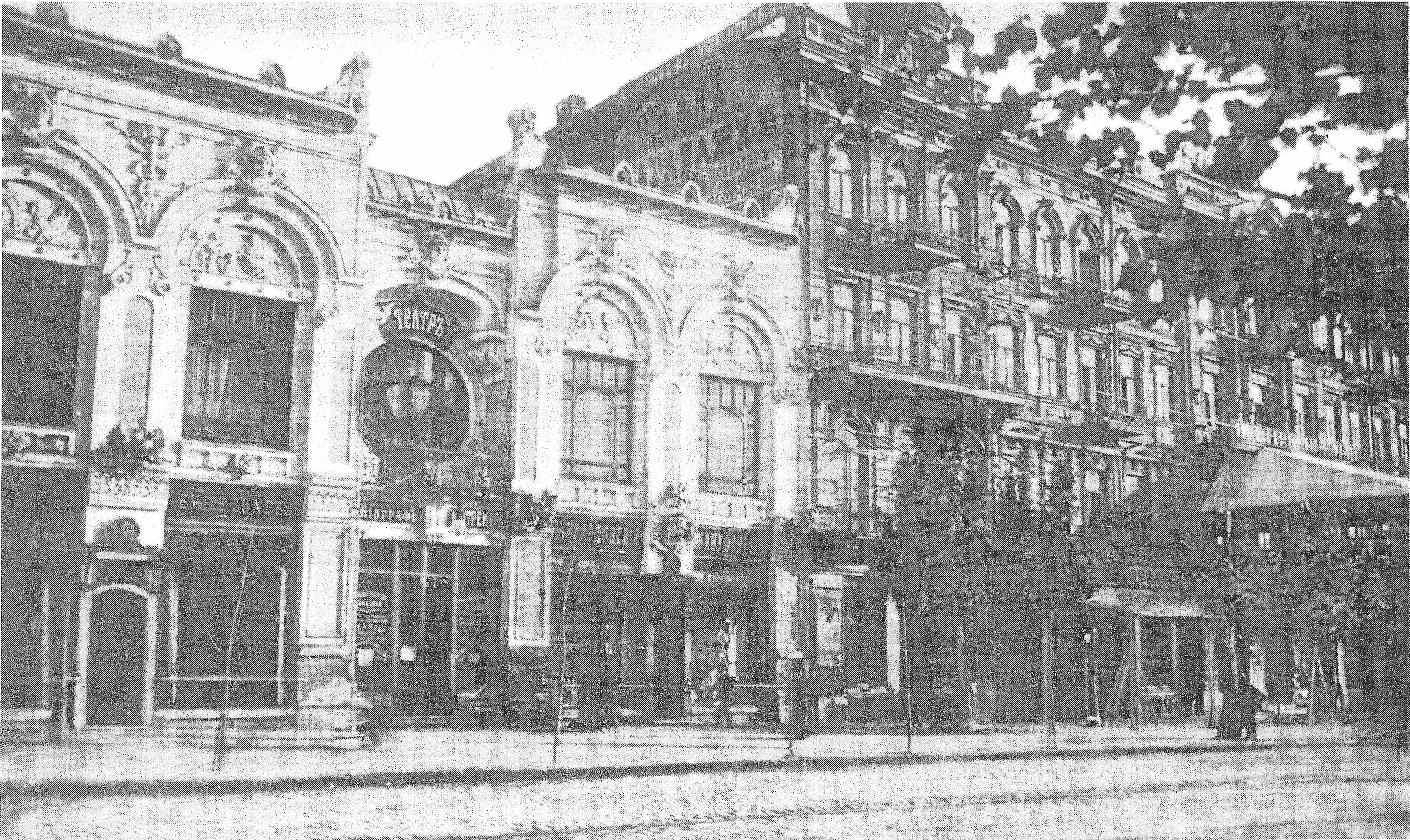 Торговый дом Яблоковых и гостиница "Большая Московская" на дореволюционной открытке